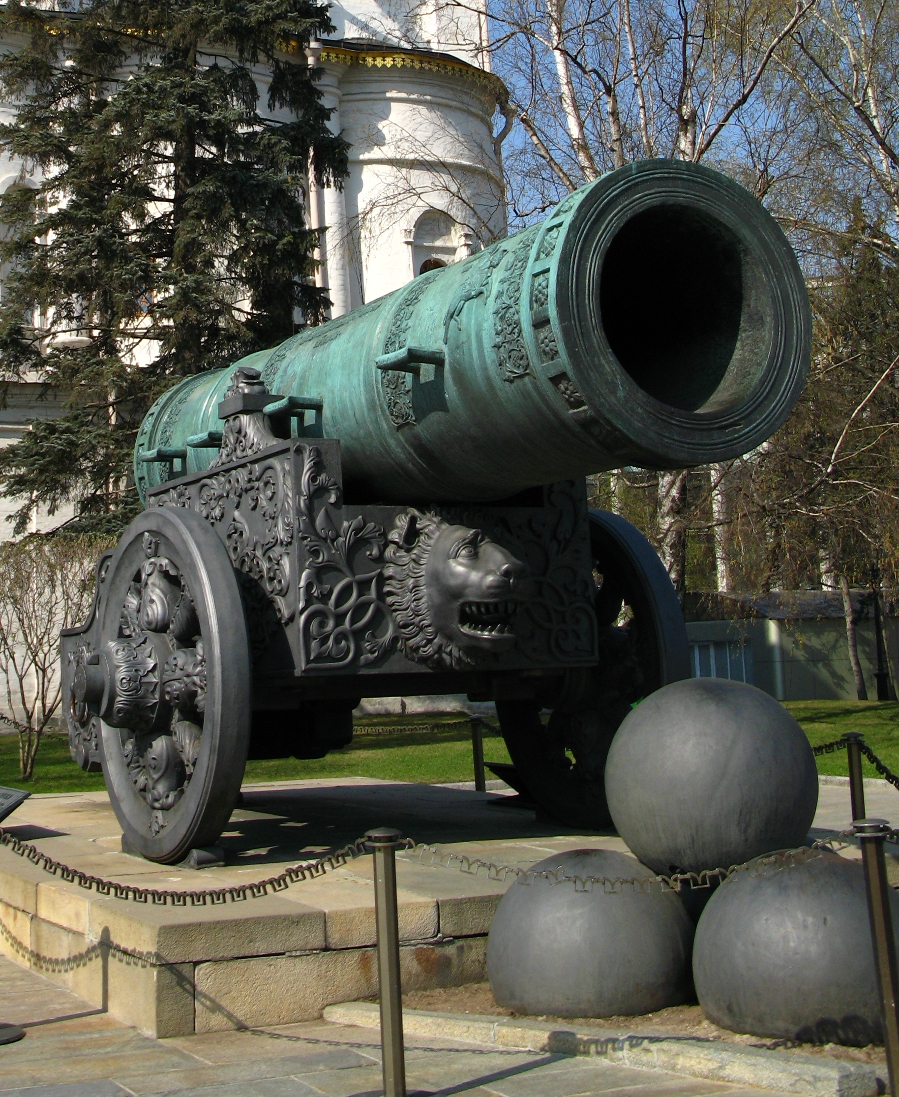 Car-top. Moskva.